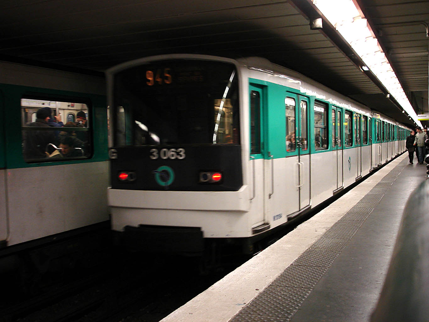 Station Miromesnil de la ligne 9 du métro de Paris, France.